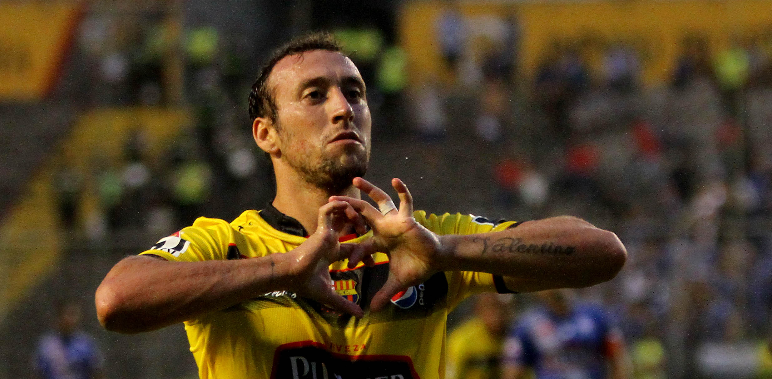 Guayaquil 10 de may (Andes).-Barcelona enfrenta a Emelec en el tradicional Clásico del Astillero en la fecha 17 del campeonato ecuatoriano de fútbol, en la gráfica Bryan Aleman festeja su anotación Foto:César Muñoz/Andes